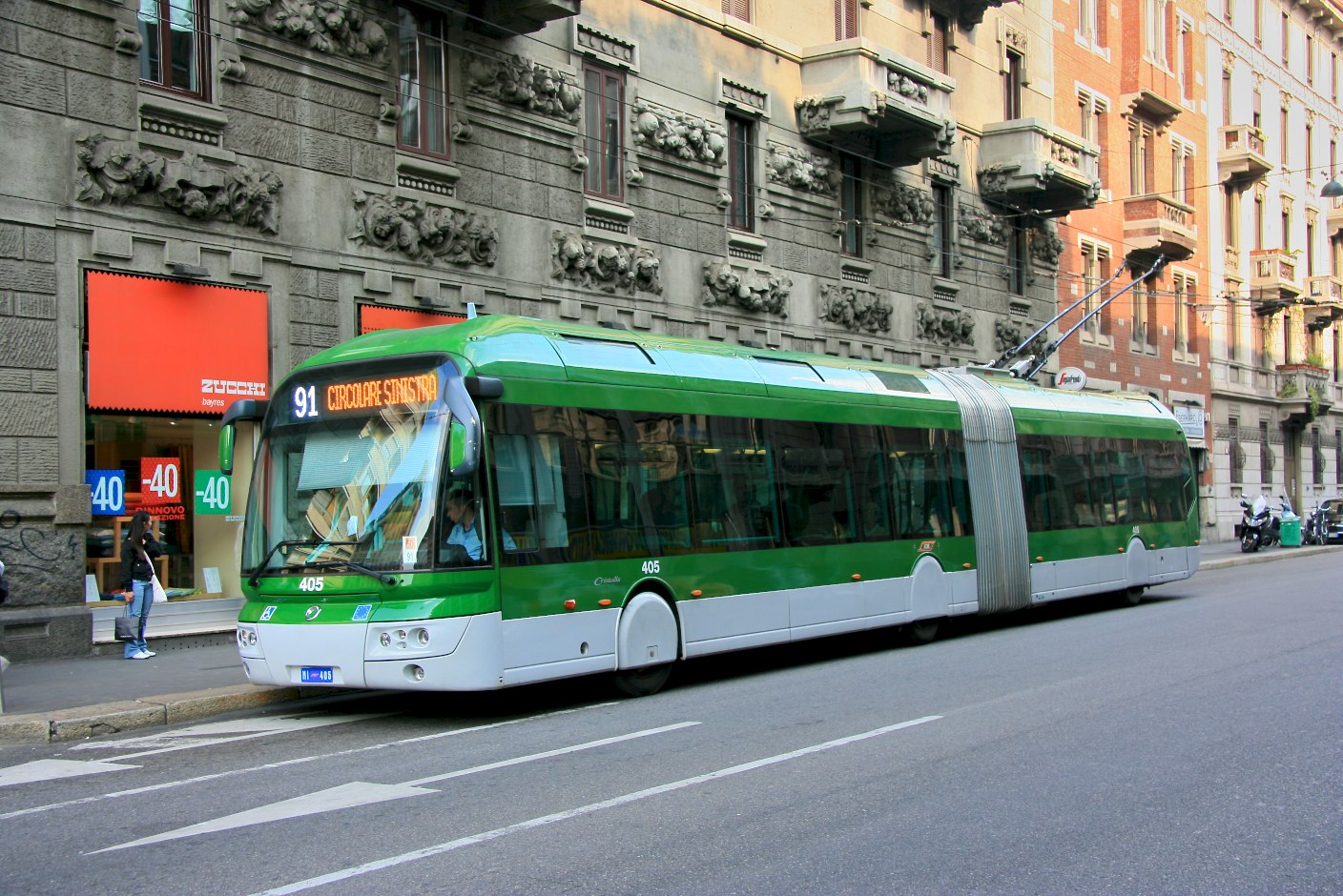 Vettura filoviaria 405 dell'ATM di Milano in via Stradivari